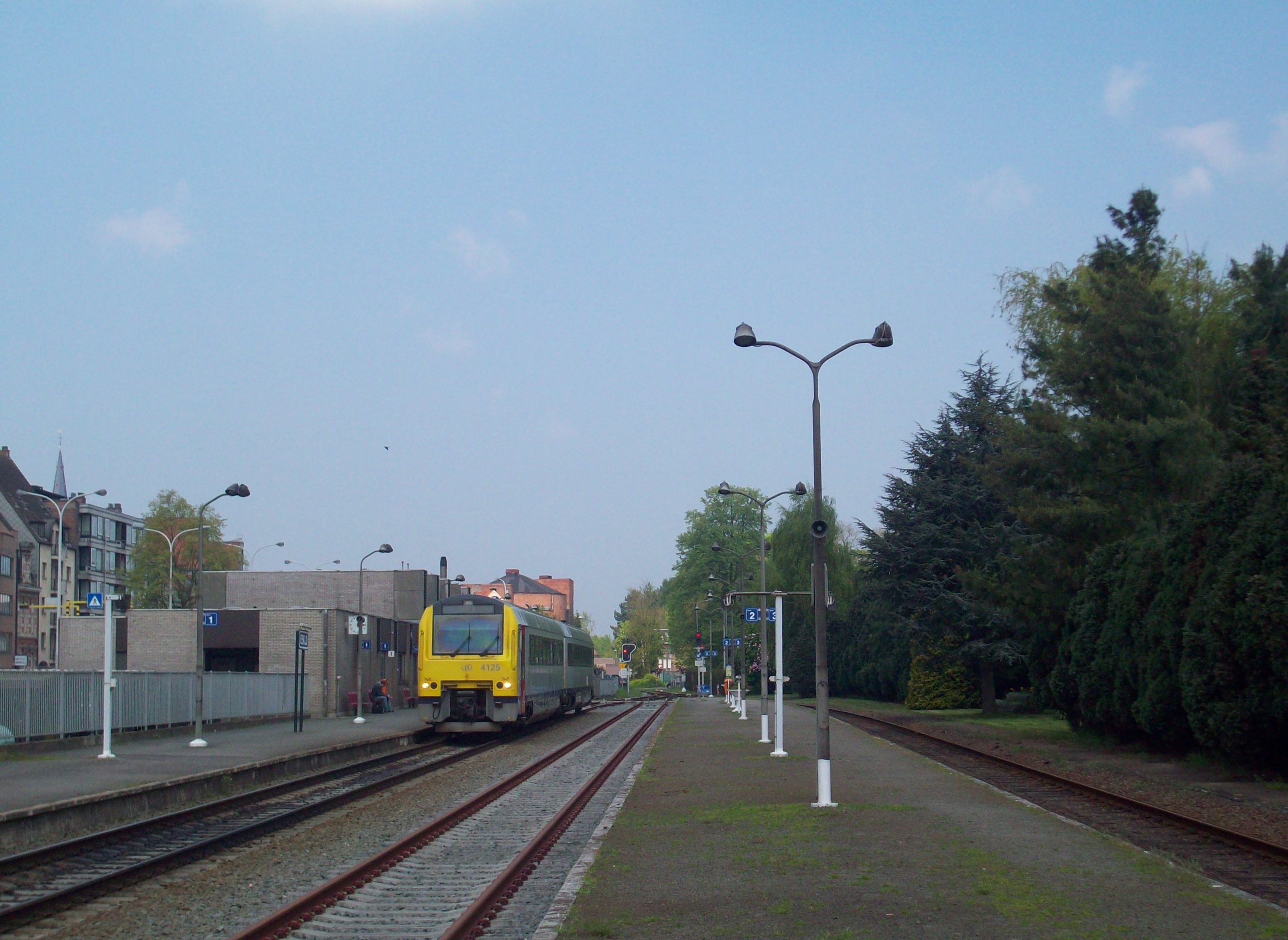 Perrons van het station van Eeklo